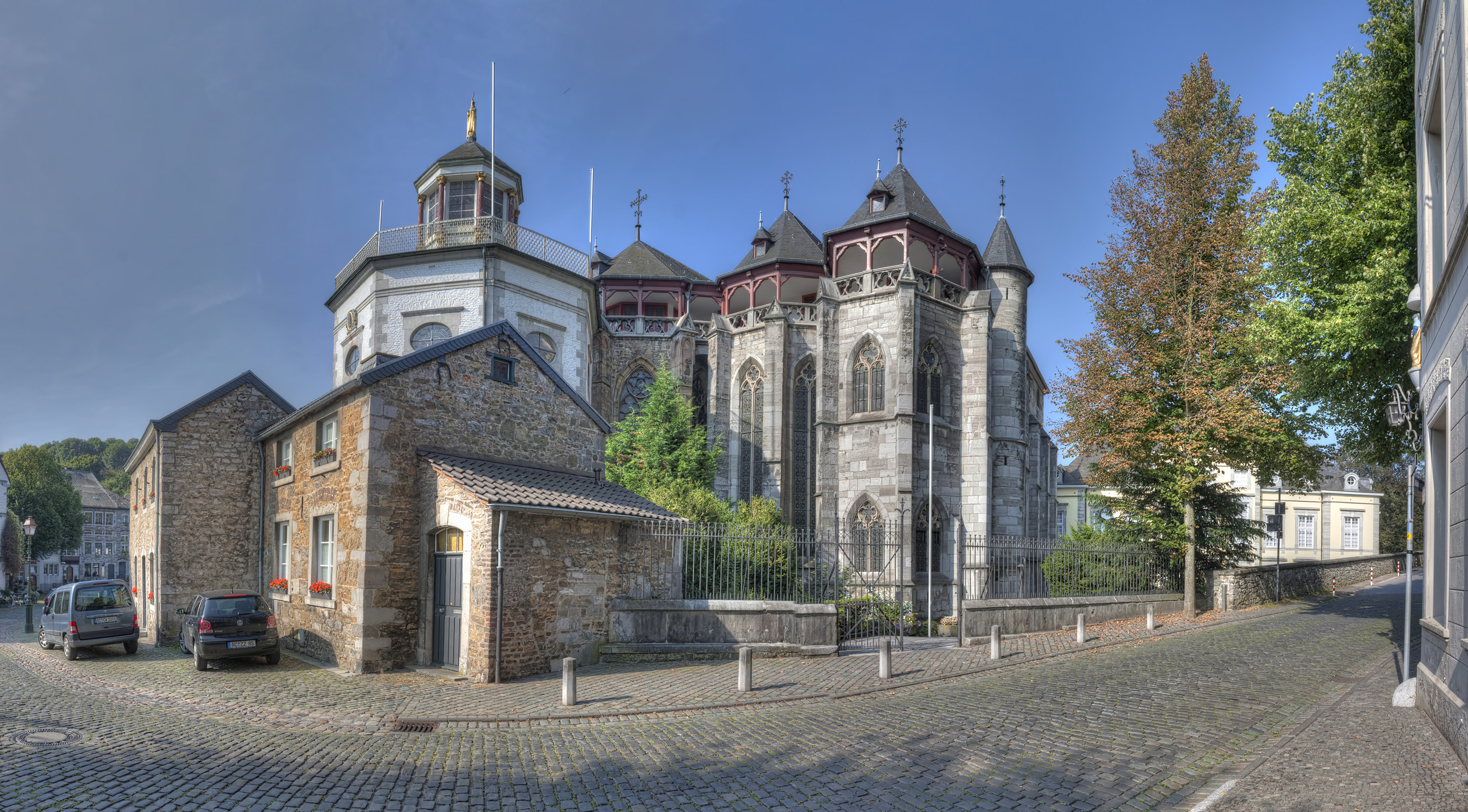 Kornelimuenster, Propsteikirche St. Kornelius, Korneliusmarkt, ehemalige Abteikirche der Benediktiner, 1804 Pfarrkirche, 5-schiffige Kirche mit vorw. gotischem Baustil, 14./15. Jh. erweitert mit romanischen Anteilen, oktogonaler Kapellenanbau im 18. Jh.This is a photograph of an architectural monument., no. 0